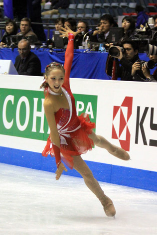 Полина Шелепень на финале юниорского Гран-при сезона 2009-2010. Короткая программа.